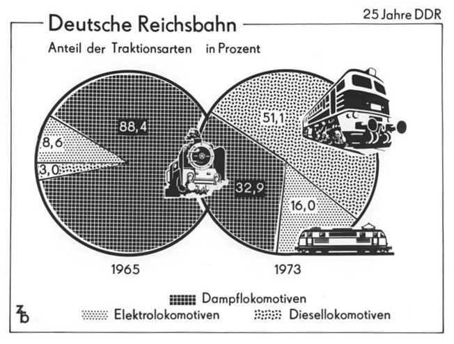 Infografik, Deutsche Reichsbahn, Anteil der Traktionsarten ADN-ZB Grafik 18.9.74 Deutsche Reichsbahn-1973 wurden über 280 Mill. Tonnen Güter von der Eisenbahn der DDR transportiert, das sind 6 Mill. Tonnen mehr als 1972. Die steigenden Transportanforderungen der Wirtschaft sowie des Import- und Transitverkehrs bedingen eine ständige Verbesserung der Verkehrsverhältnisse. Im 1. Halbjahr 1974 wurden weitere neue Fahrzeuge in den Dienst gestellt, u.a. moderne leistungsfähige Diesel- und Elektrolokomotiven. Der Anteil der mit diesen Triebfahrzeugen durchgeführten Transporte belief sich 1973 auf mehr als 67 % und stieg im 1. Halbjahr 1974 auf 71 %. (Quelle: Statistisches Jahrbuch der DDR 1974 und Mitteilung der Staatl.Zentralverwaltung für Statistik über die Durchführung des Volkswirtschaftsplanes 1974 im 1.Halbjahr)